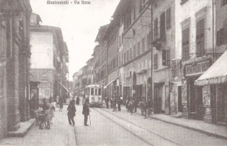 Montevarchi - tram in via Roma